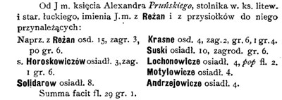 Уривок з люстрації земель Київського замку в реєстрі збору податків 1581 року. Серед маєтностей князя Олександа Пронського села Рижани та присілків до нього належачих: Горошковичів та Солодирів.